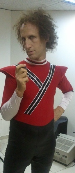 ערן שדר בתוכנית פוטו פיניש 2012